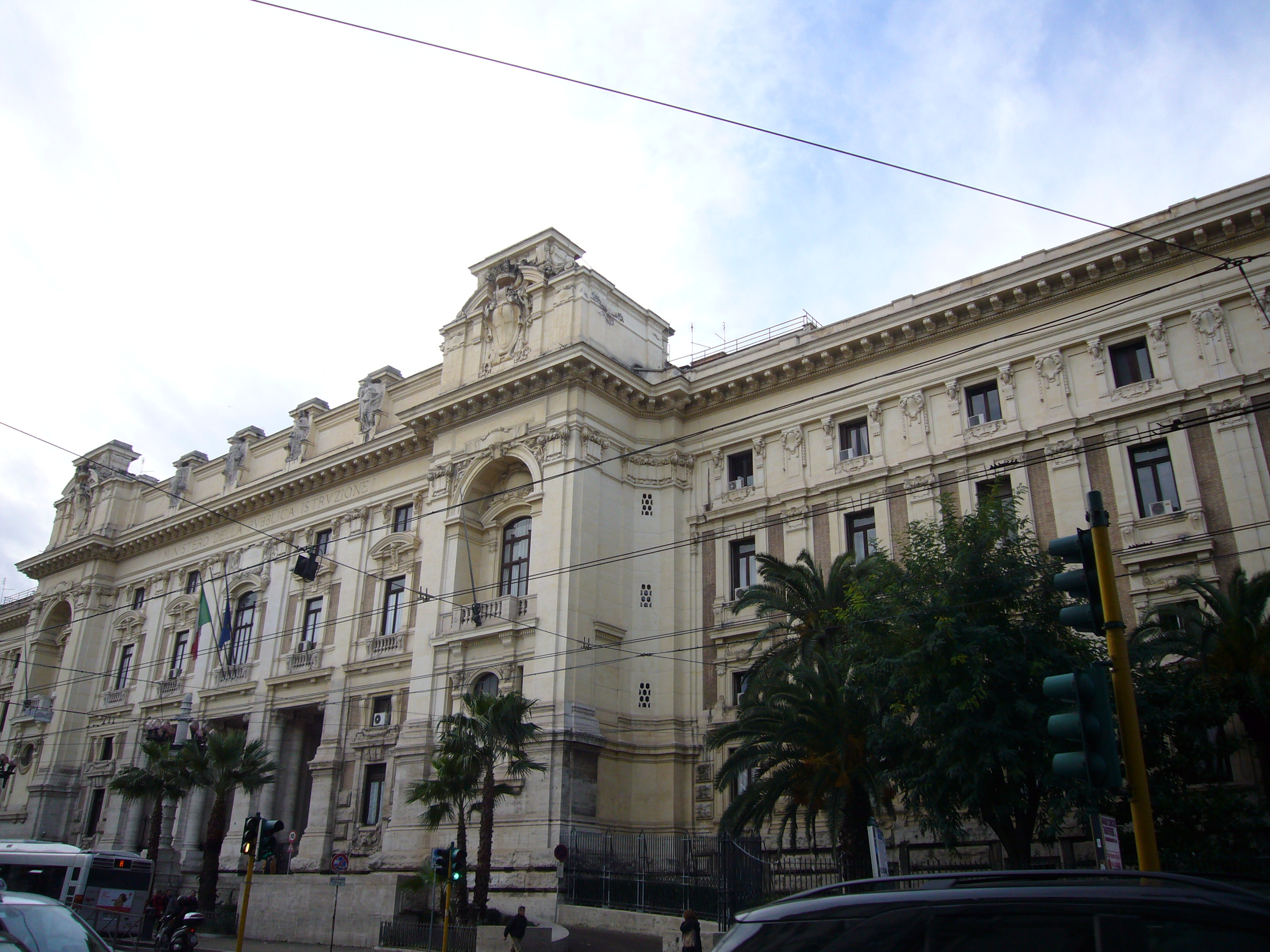 Roma, Ministero della Pubblica Istruxione a viale Trastevere